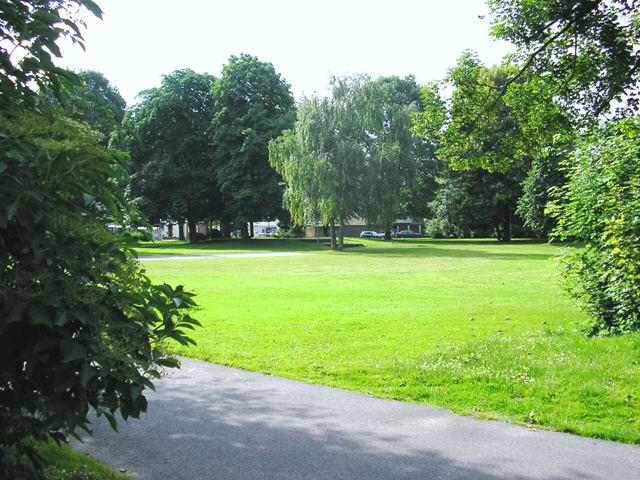 Grüne lunge in Bergheim Niederaußem